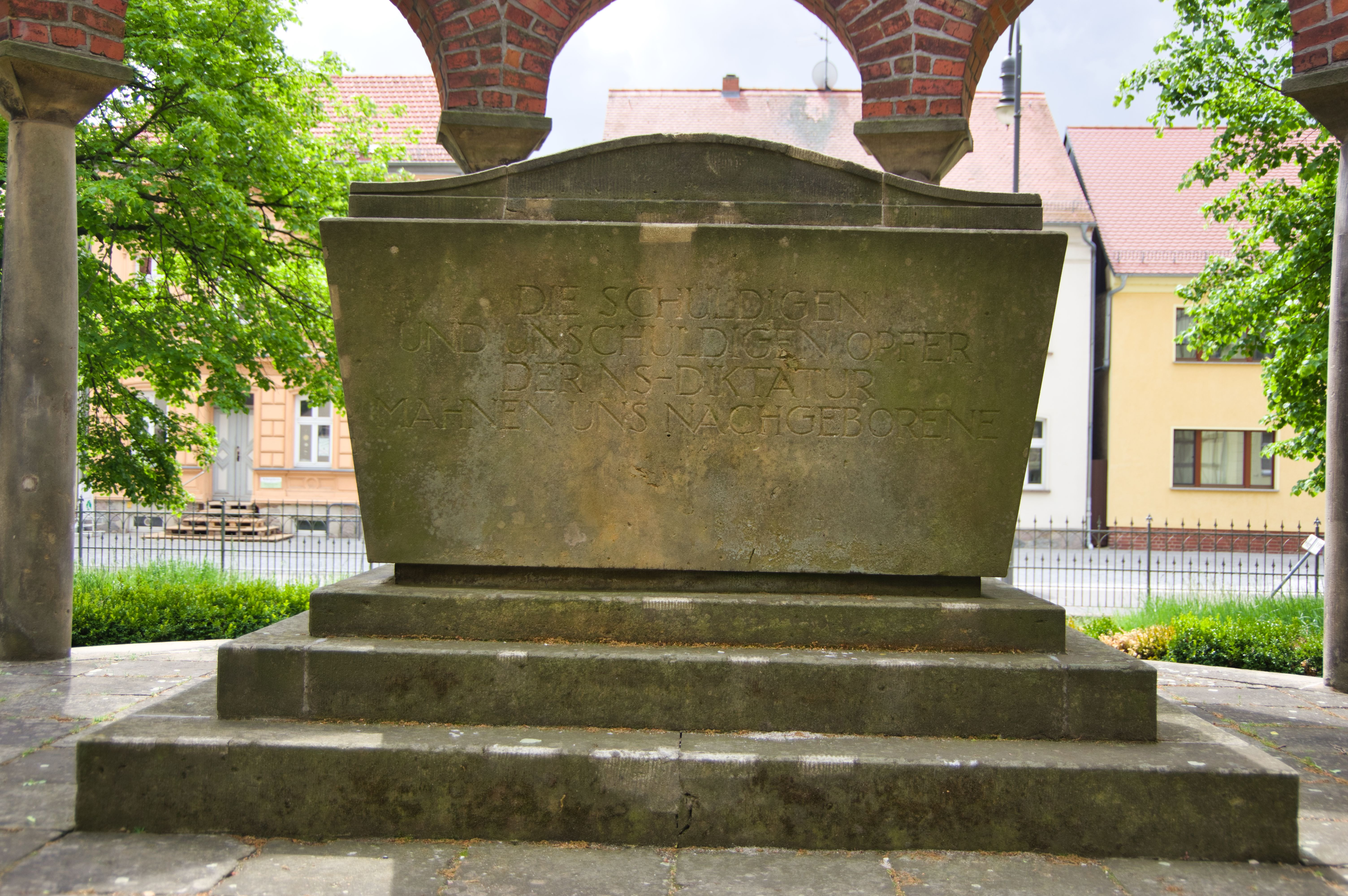 Jüterbog in Brandenburg. Das Kriegerdenkmal befindet sich auf dem Nikolaikirchhof südlich der Nikolaikirche und nördlich der Großen Straße. Das Denkmals steht unter Denkmalschutz.